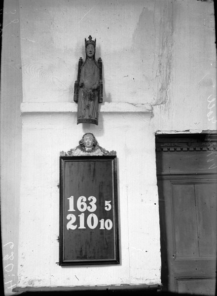 Nummertavla, samt "Viklaumadonnans" dåvarande placering.